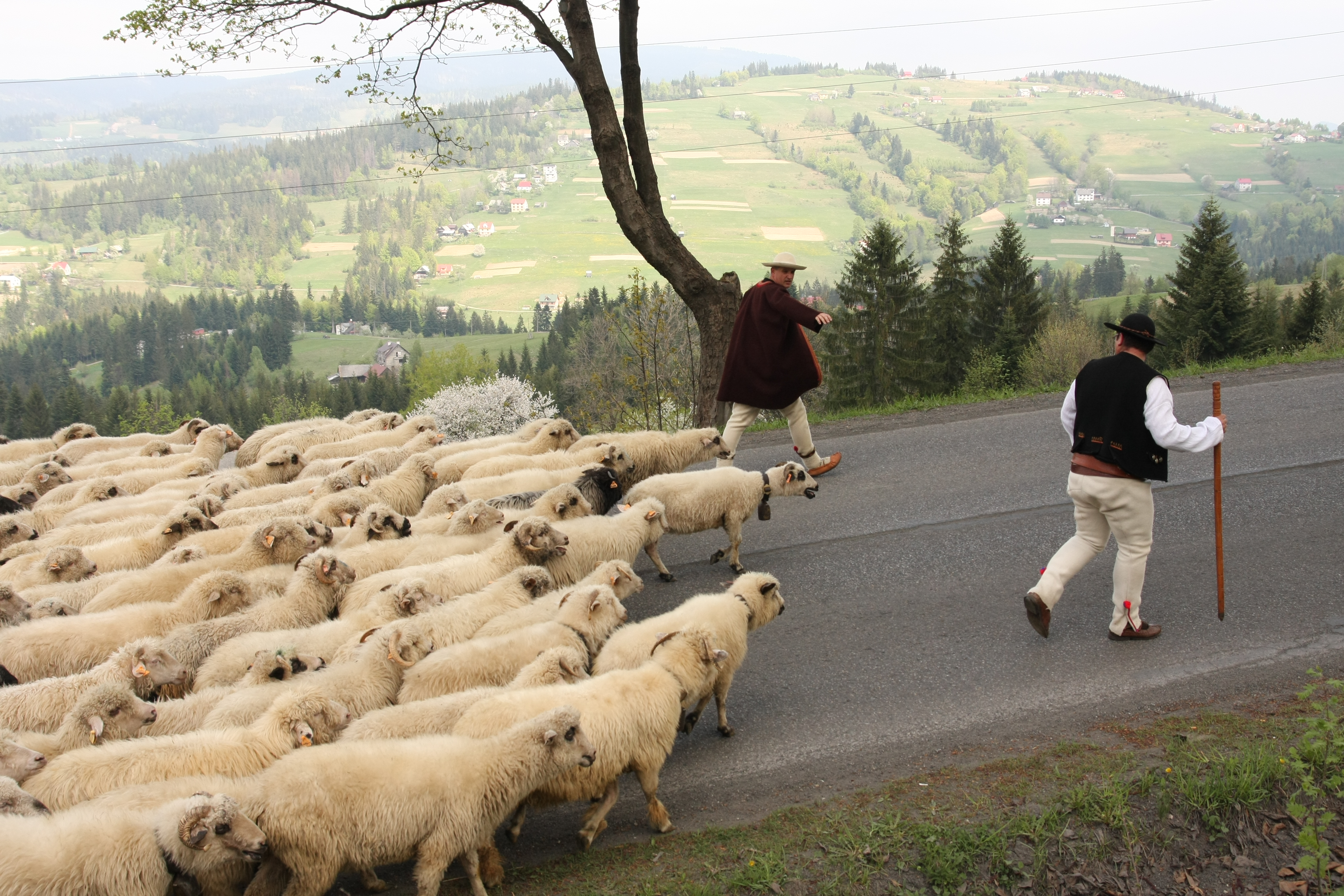 Corocznie w Koniakowie z początkiem maja odbywa się wiosenny redyk tzw. miyszanie owiec, podczas którego kilka mniejszych stad łączy się w jedno wielkie. Gazdowie oddają pod opiekę swoje stada bacy, który wraz z juhasami wyrusza na redyk na Ochodzitą. W tym dniu można zobaczyć odświętne regionalne stroje, usłyszeć głos trombity oraz zobaczyć pastereskie zwyczaje np. poświęcenie stada, okadzanie koszora i miyszani owiec wokół moja ustawionego na szczycie Ochodzitej.